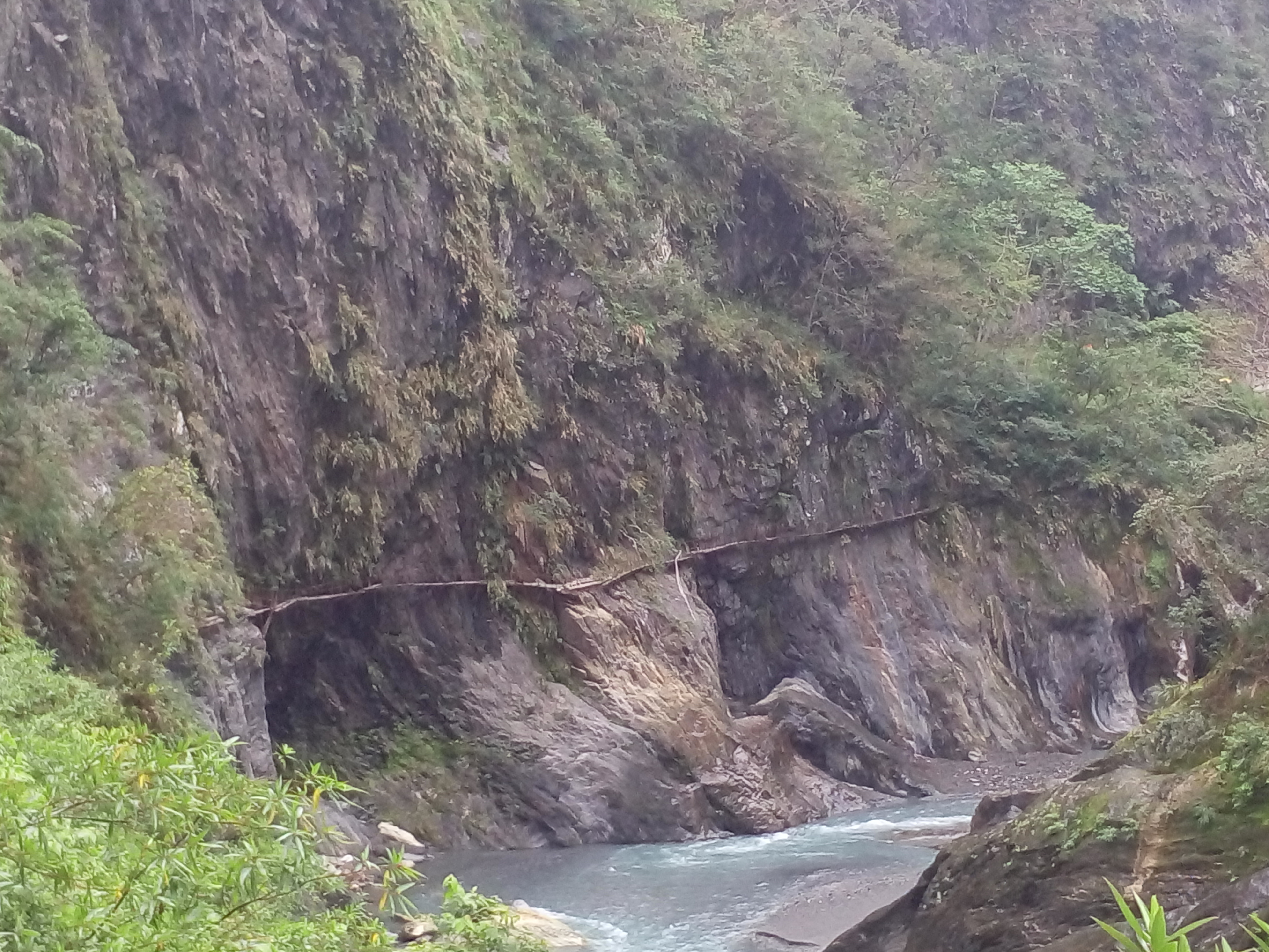 中文（台灣）: 臺灣電力公司於南溪壩先期施工時期時通達預定壩址的簡易木棧道，目前南溪壩聯外道路通車後，該木棧道已荒廢